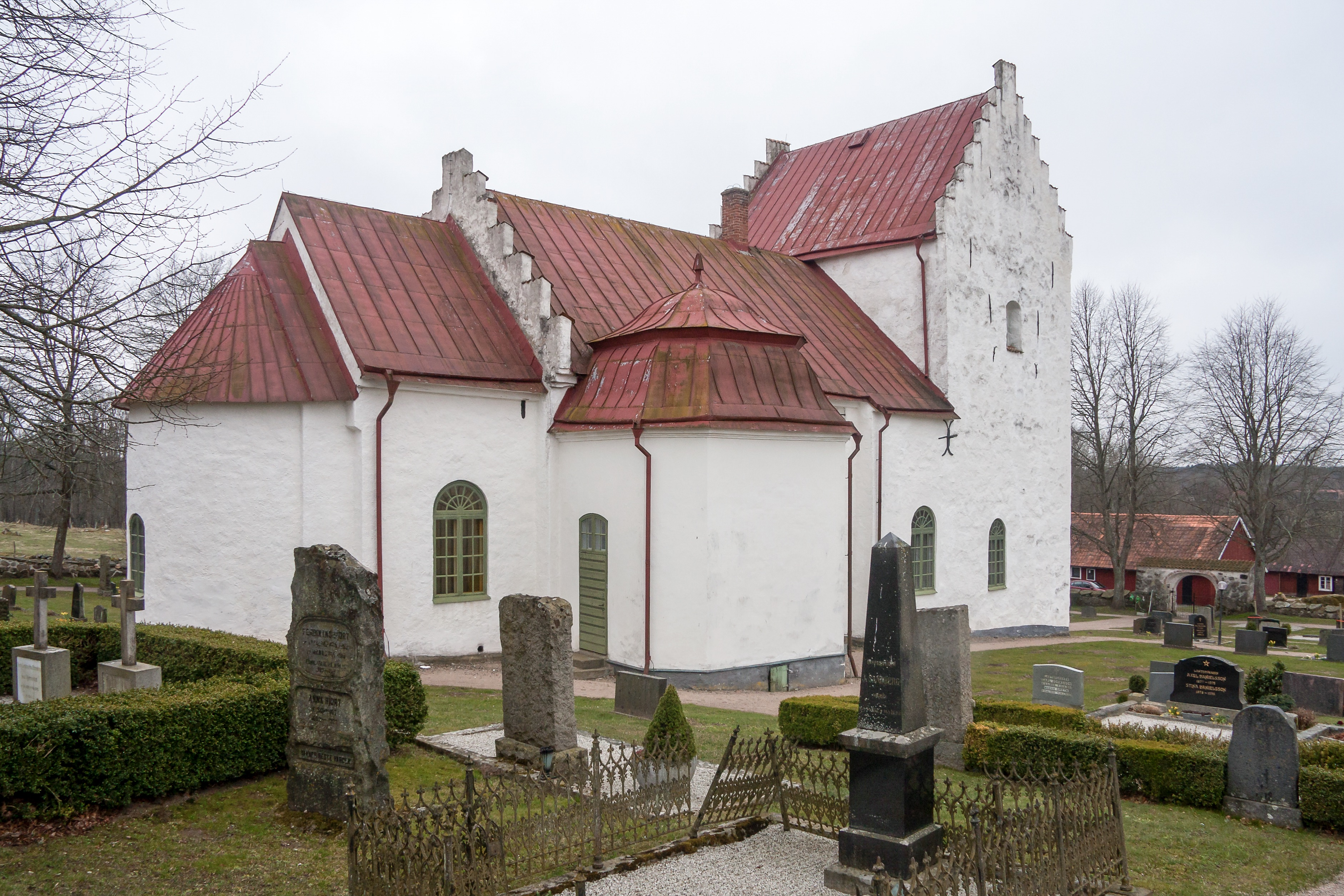 Gryts kyrka utanför Knislinge i Östra Göinge kommun.